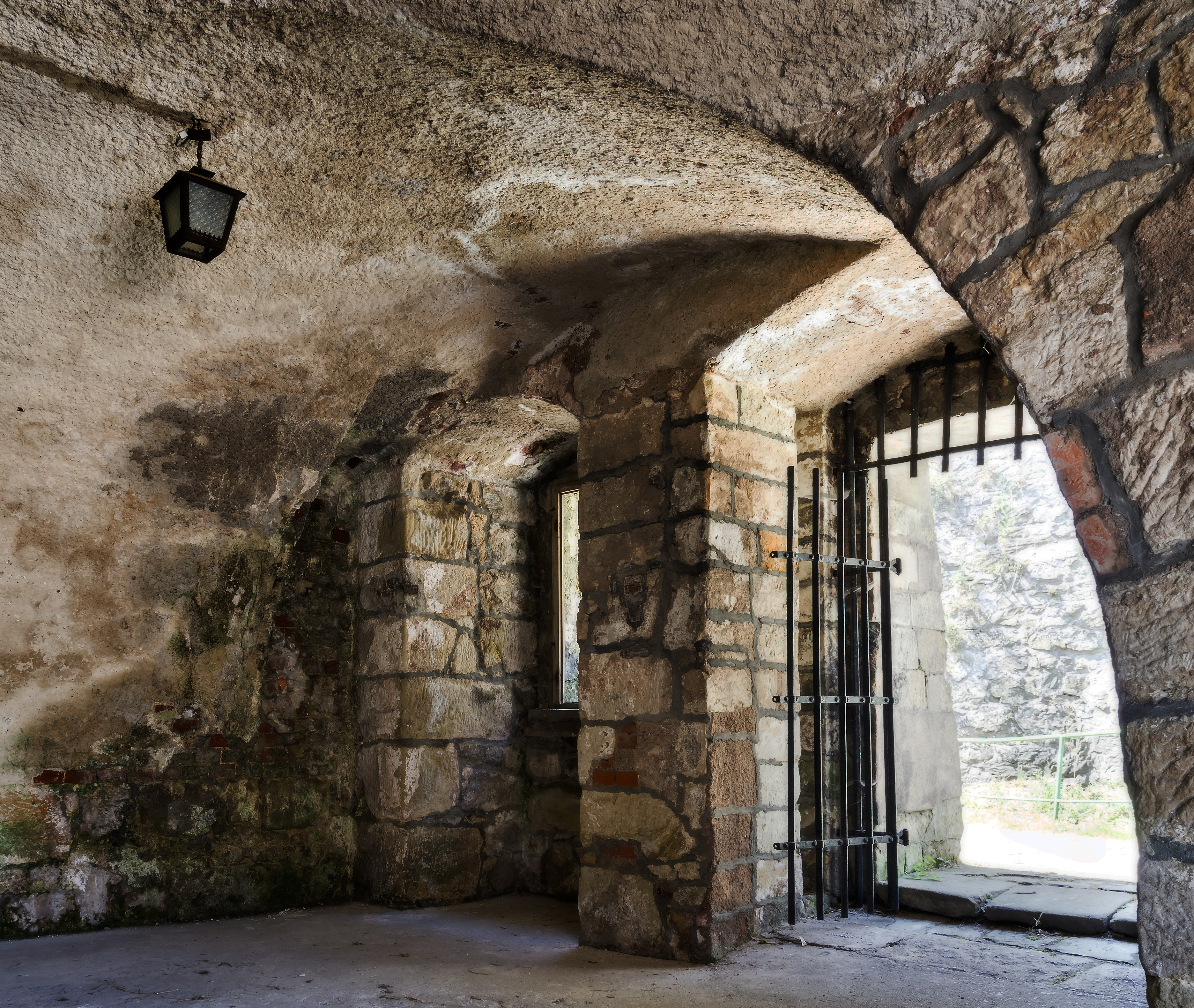 Kłodzko - Twierdza Kłodzko, jedno z wielu przejść i tuneli This photo of Lower Silesian Voivodeship was taken during Wikiexpedition 2013 set up by Wikimedia Polska Association. You can see all photographs in category Wikiekspedycja 2013.